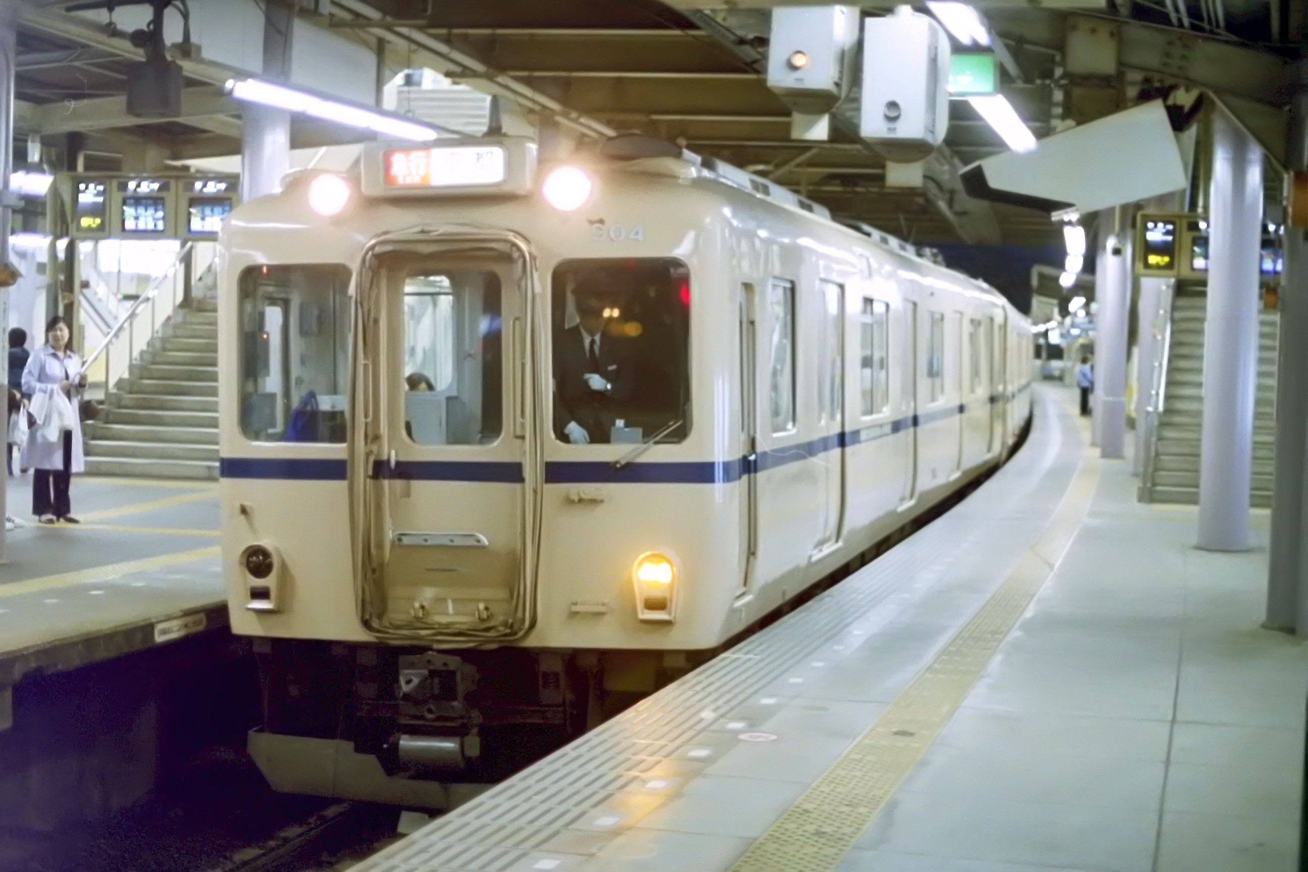 近鉄900系旧塗装 2001年 西大寺駅